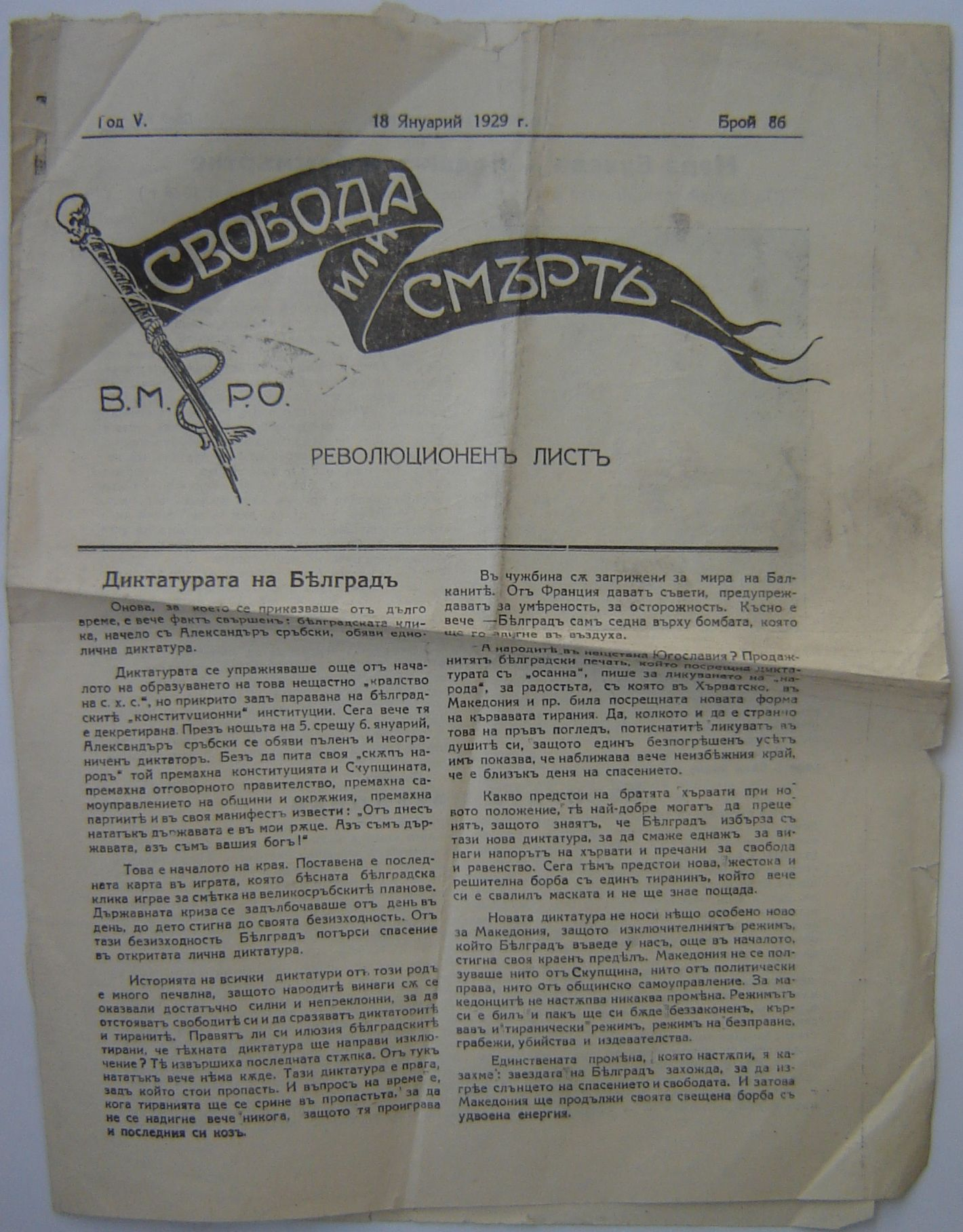 Вестникът на ВМРО "Свобода или смърт".